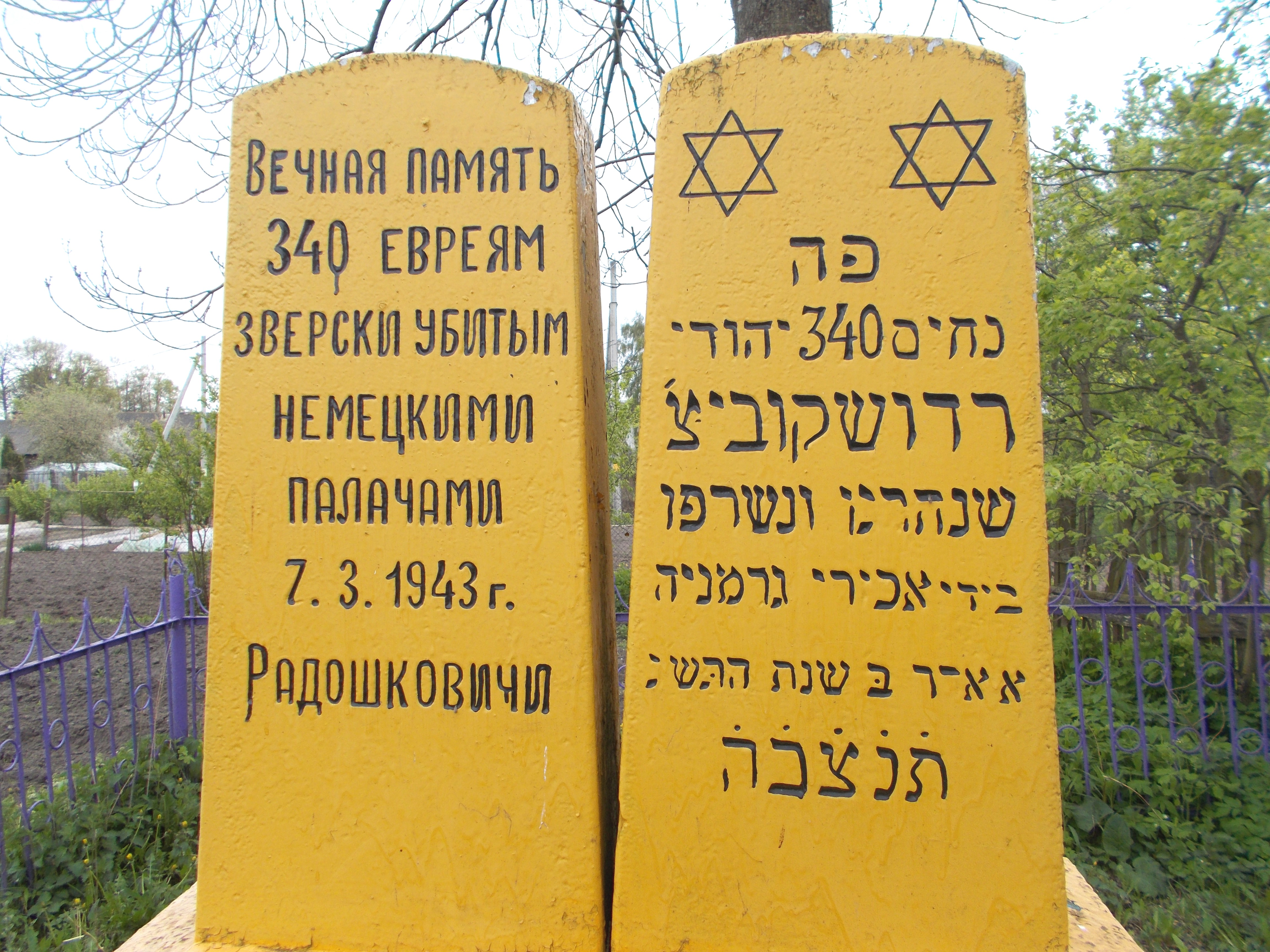 Памятник на месте убийства 340 евреев Радошковичей 7 марта 1943 года. Находится около Радошковичской школы-интерната (улица Гастелло, 20).